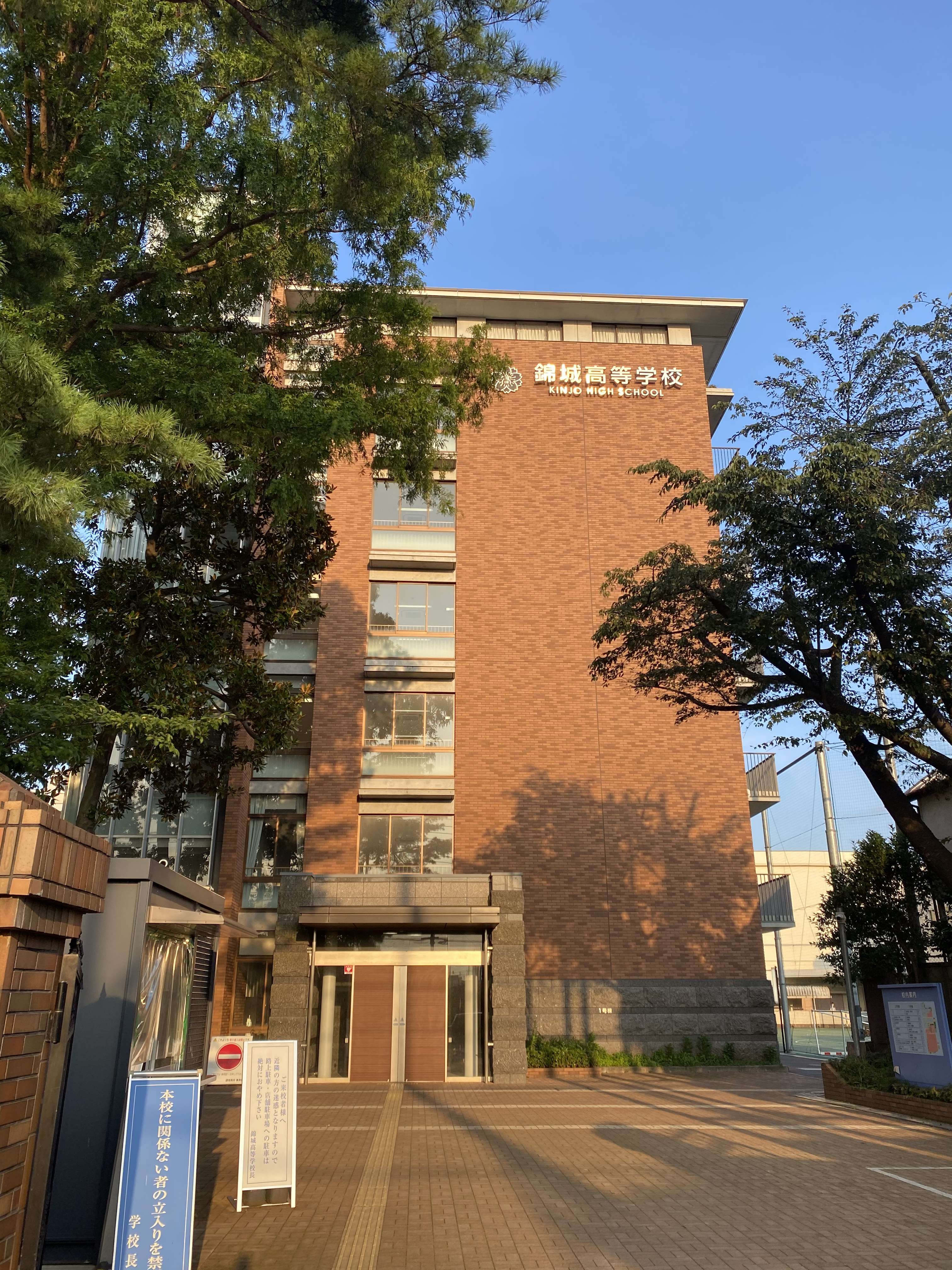 正門より撮影